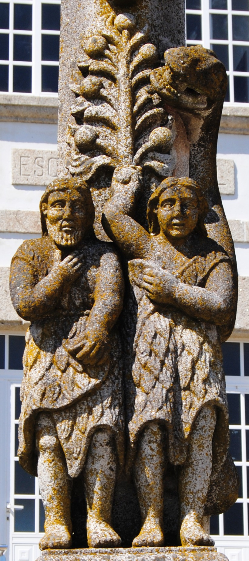 O Rosal, Tabagón, Pecado Orixinal